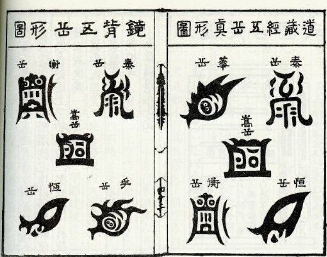 明萬曆刻本《遵生八箋》中的兩幅《五嶽真形圖》（Wuyue zhenxing Tu / the Map of the True Form of the Five Sacred Mountains）